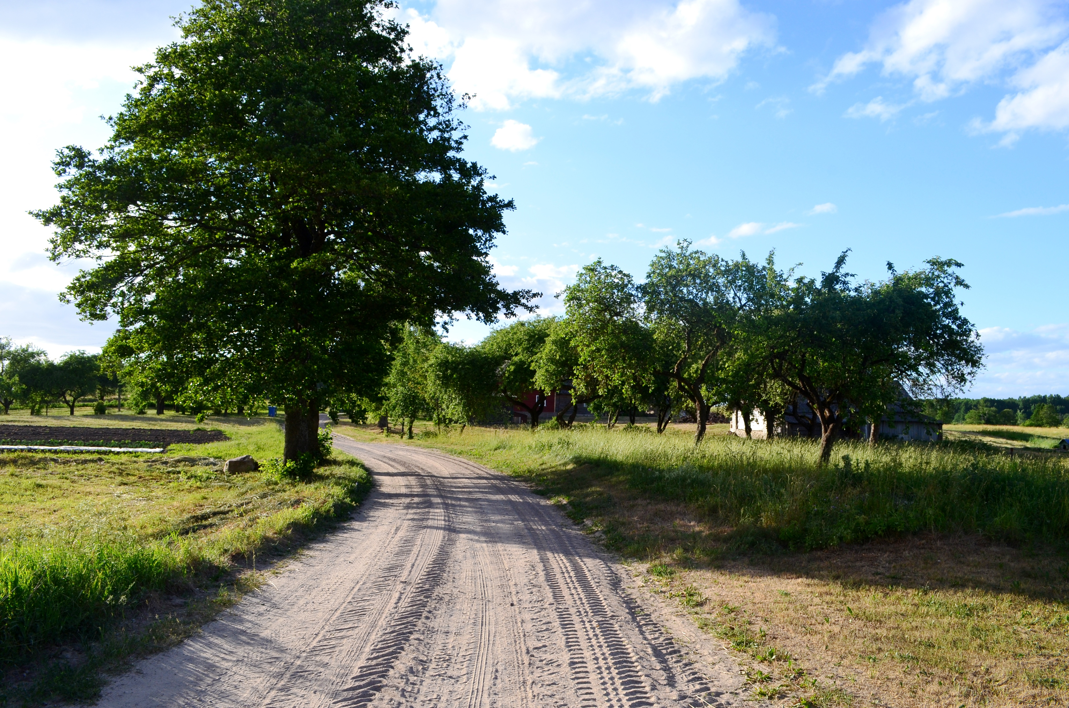 Mikniūnai, Varėnos raj.